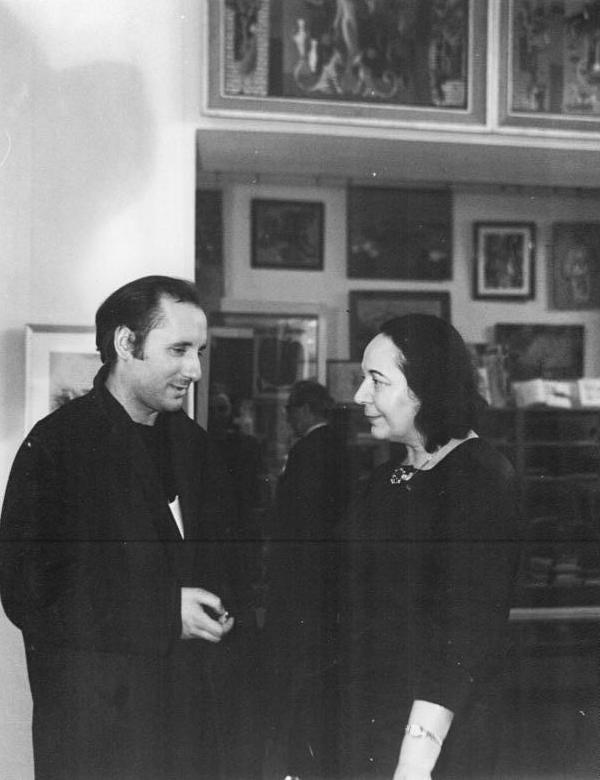 Zentralbild ZB 22.2.1966 Westberlin: Hans Grundig-Ausstellung eröffnet Eine Ausstellung von Werken des Malers Hans Grundig, der am 19. Februar 1966 das 65. Lebensjahr vollendet hätte, wurde am 21.2.1966 in Anwesenheit von Frau Prof. Lea Grundig in der Westberliner Ladengalerie Bleibtreustraße eröffnet. UBz: Frau Prof. Lea Grundig im Gespräch mit einem Besucher der Ausstellung.